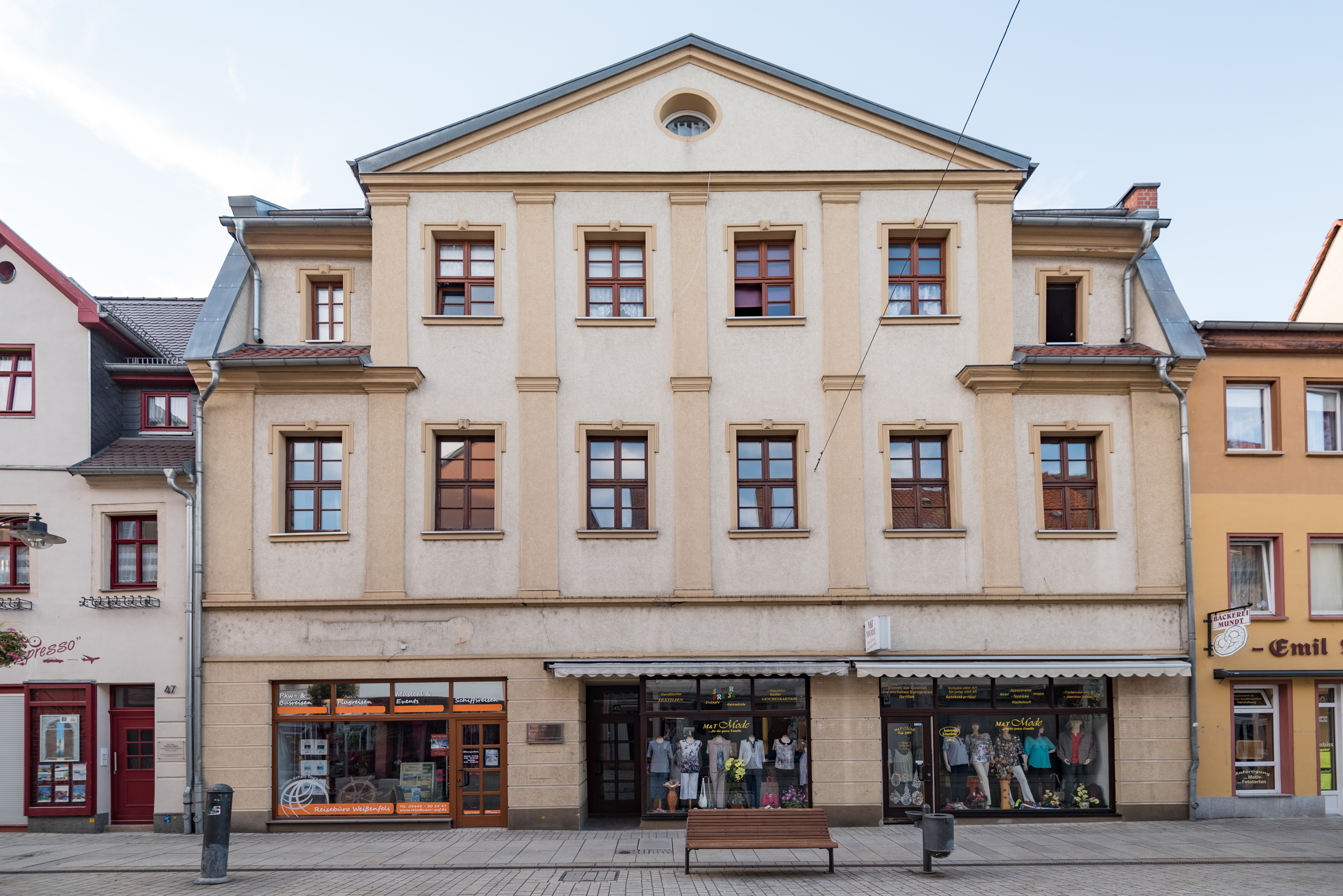 Weißenfels, Jüdenstraße 45